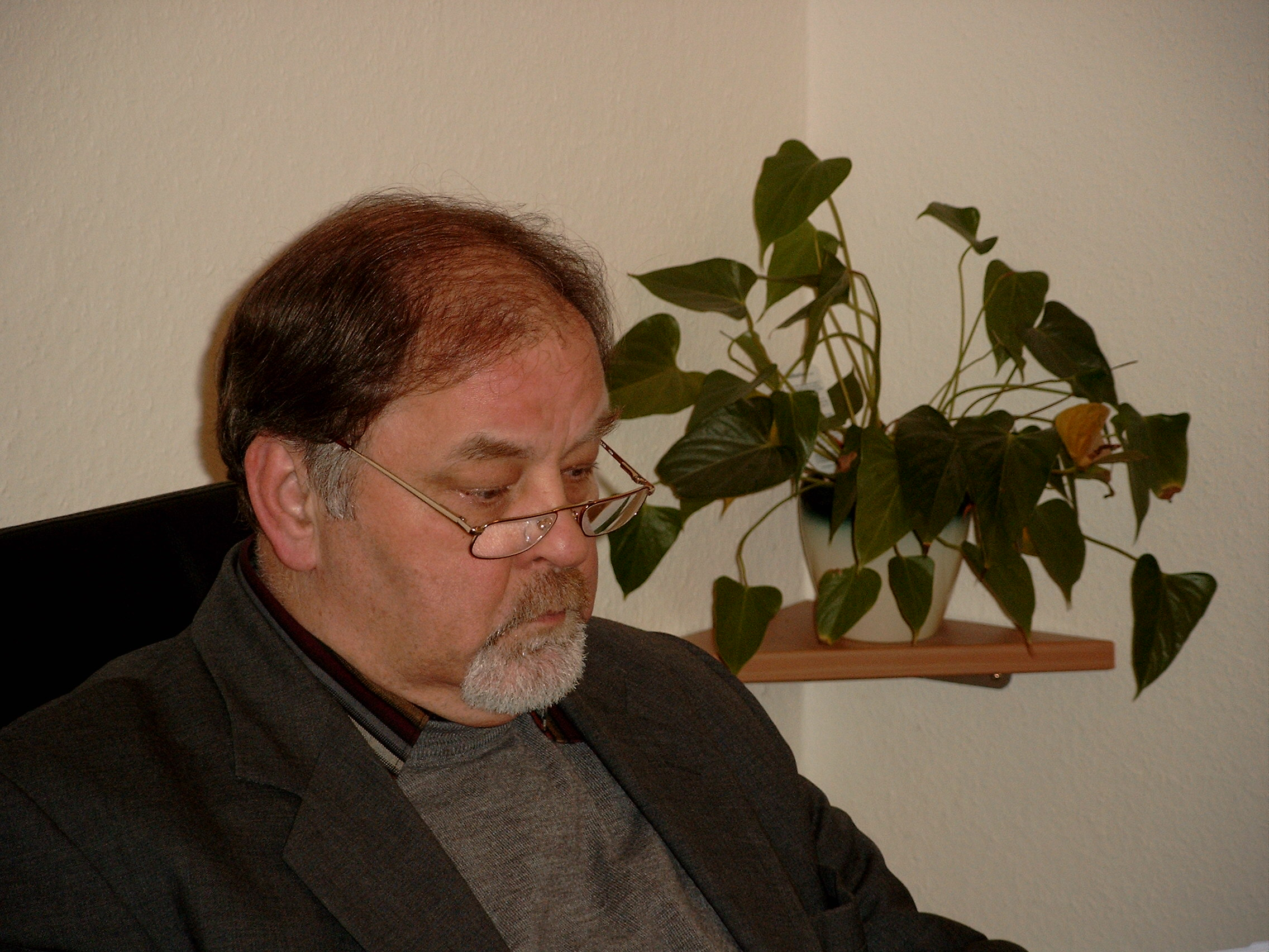 Wolfgang Brinkel